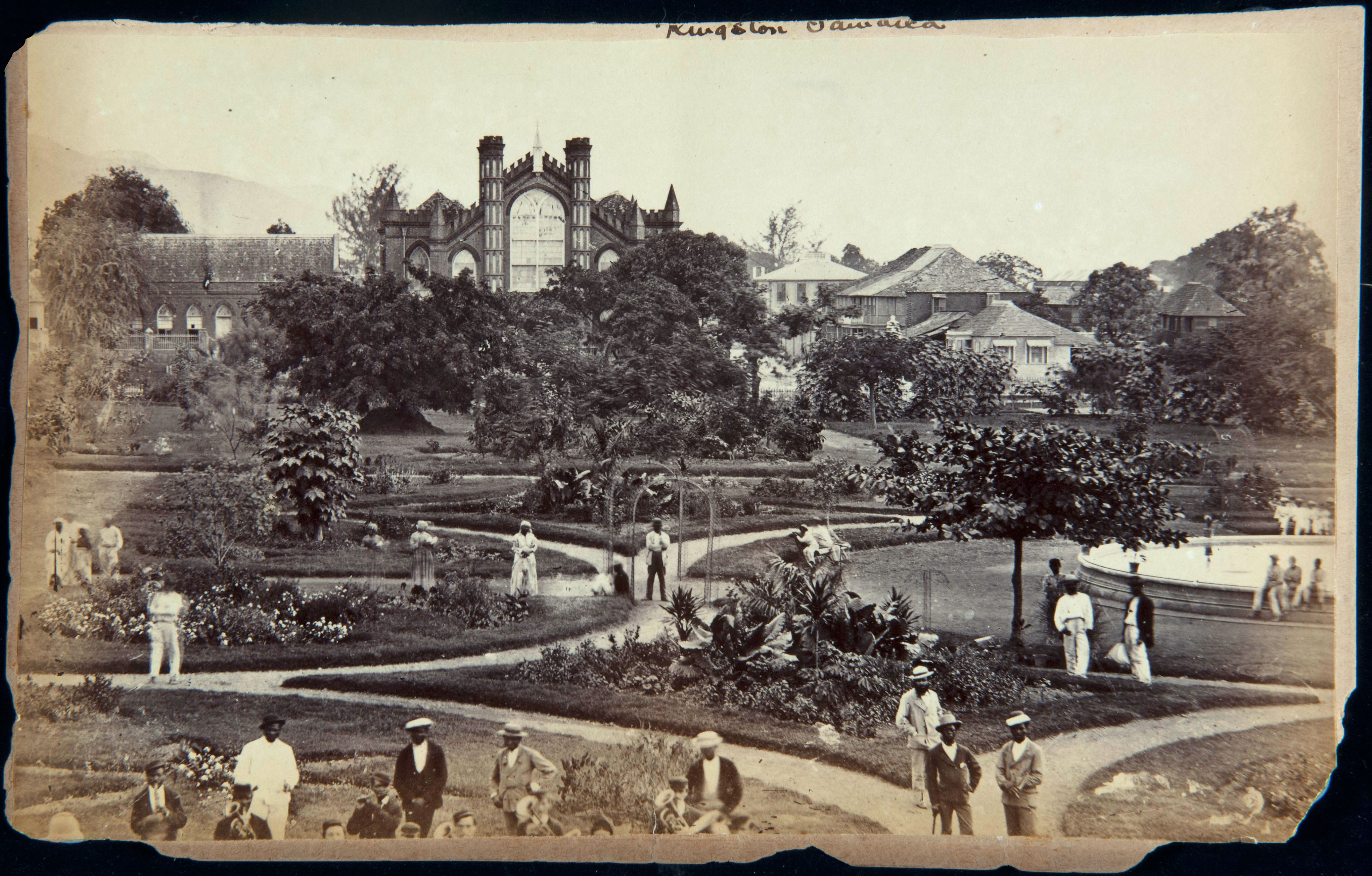 Foto.